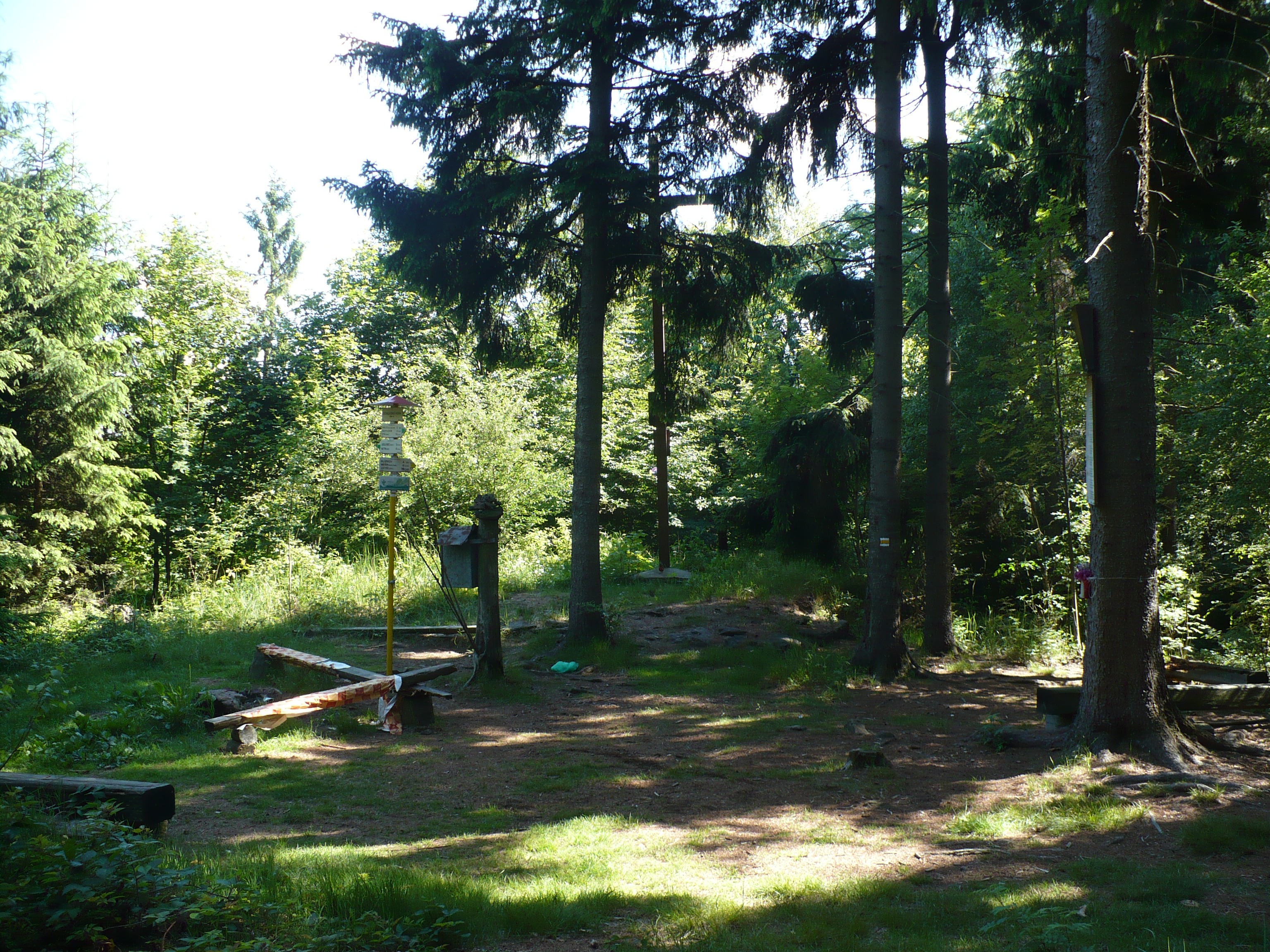 Vrchol Dědkovské hory v Křižanovské vrchovině